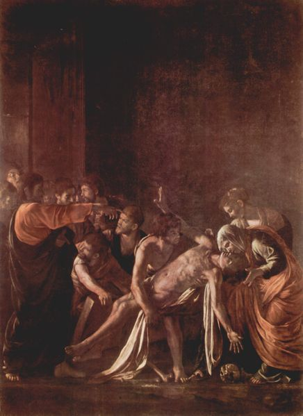 Resurrezione di Lazzaro; Messina Museo Regionale